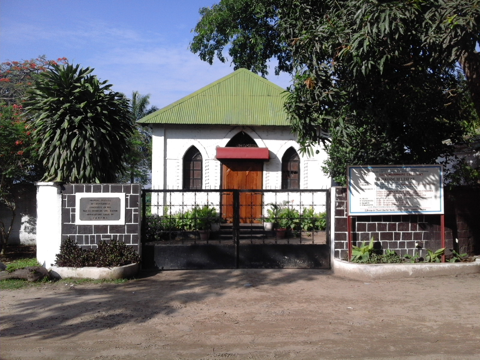 Chapelle missionnaire CBCO Sims fondée par le révérend américain Aaron Sims de l'American Baptist Foreign Mission Society (ABFMS) en 1891, proche du village de Kintambo (aujourd'hui avenue de l'Avenir, quartier Basoko, commune de Ngaliema). C'est le premier édifice chrétien érigé dans la ville.